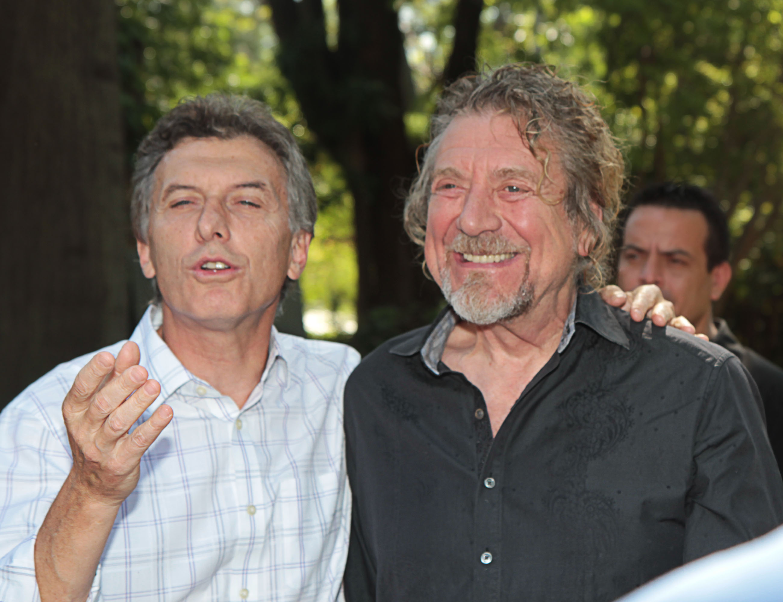 Buenos Aires. Noviembre 2 de 2012. El jefe de Gobierno porteño, Mauricio Macri, distinguió hoy como Huésped de Honor de la ciudad de Buenos Aires al músico inglés Robert Plant, quien visita el país en el marco de una gira latinoamericana. Foto: Matías Repetto Bonpland/GCBA